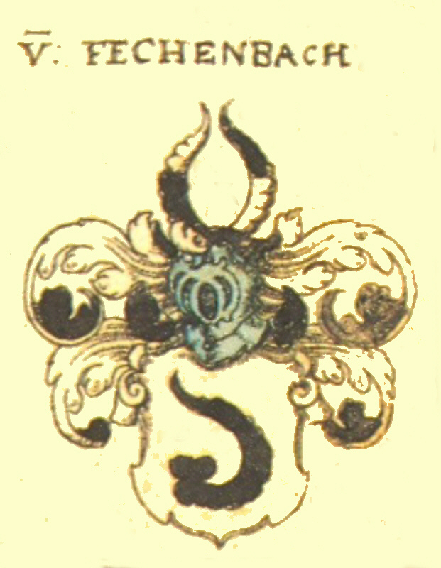 Wappen des fränkischen Adel- und Rittergeschlechts Fechenbach.